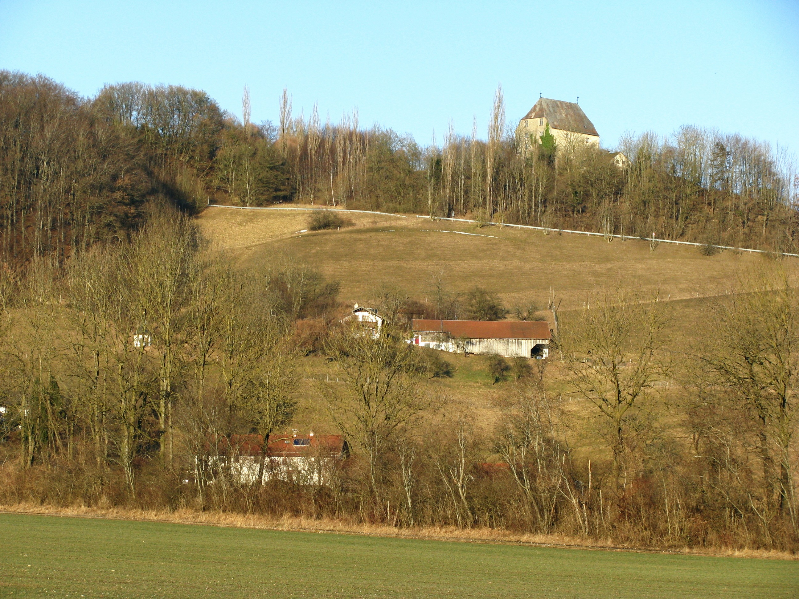 Stampflberg mit Stampflschlössl